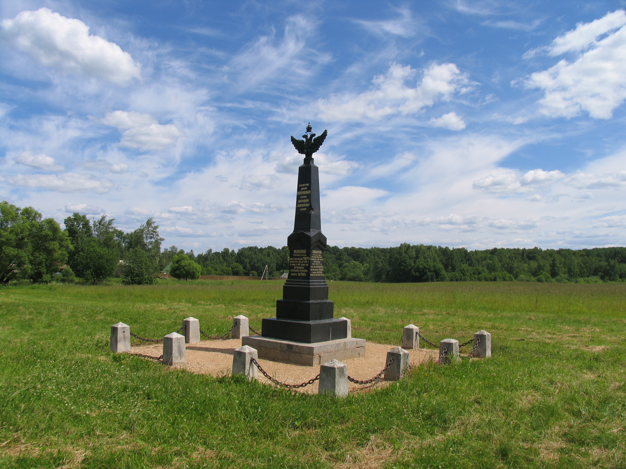 Памятник 27-й дивизии генерала Неверовского. Лицевая сторона.